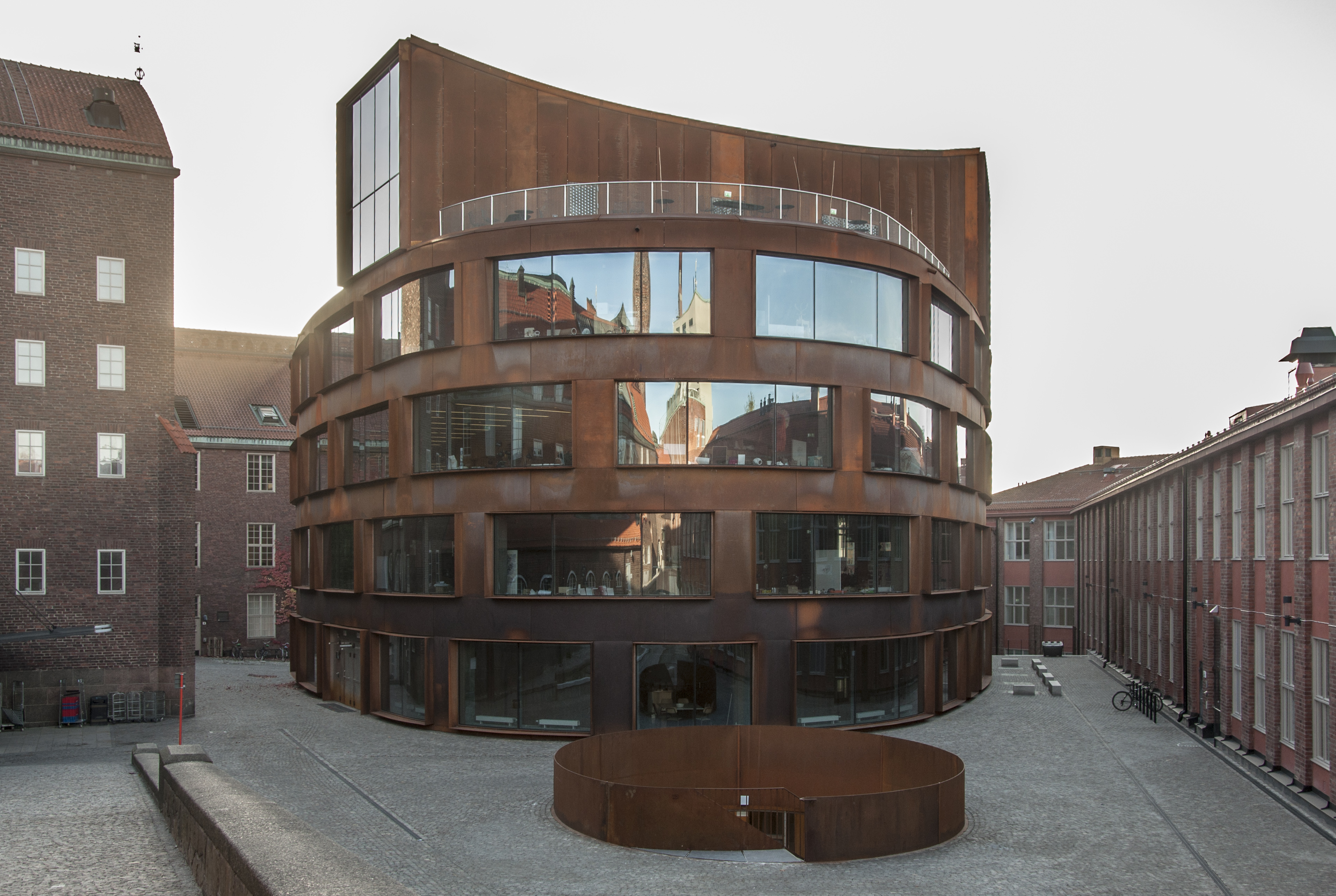 Arkitekturskolans byggnad på KTH, Osquars backe 9. Byggår 2013-2015. Arkitekter Tham & Videgård Arkitekter